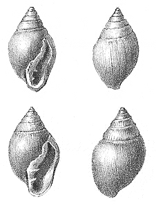 Ellobium pyramidale - Fossil gastropod from Pliocene deposits near Antwerp (Belgium)